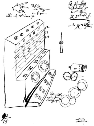 Originalzeichnung aus Friedrich Seck (Hrsg.): Wilhelm Schickard 1592–1635. Astronom, Geograph, Orientalist, Erfinder der Rechenmaschine, Tübingen 1978.